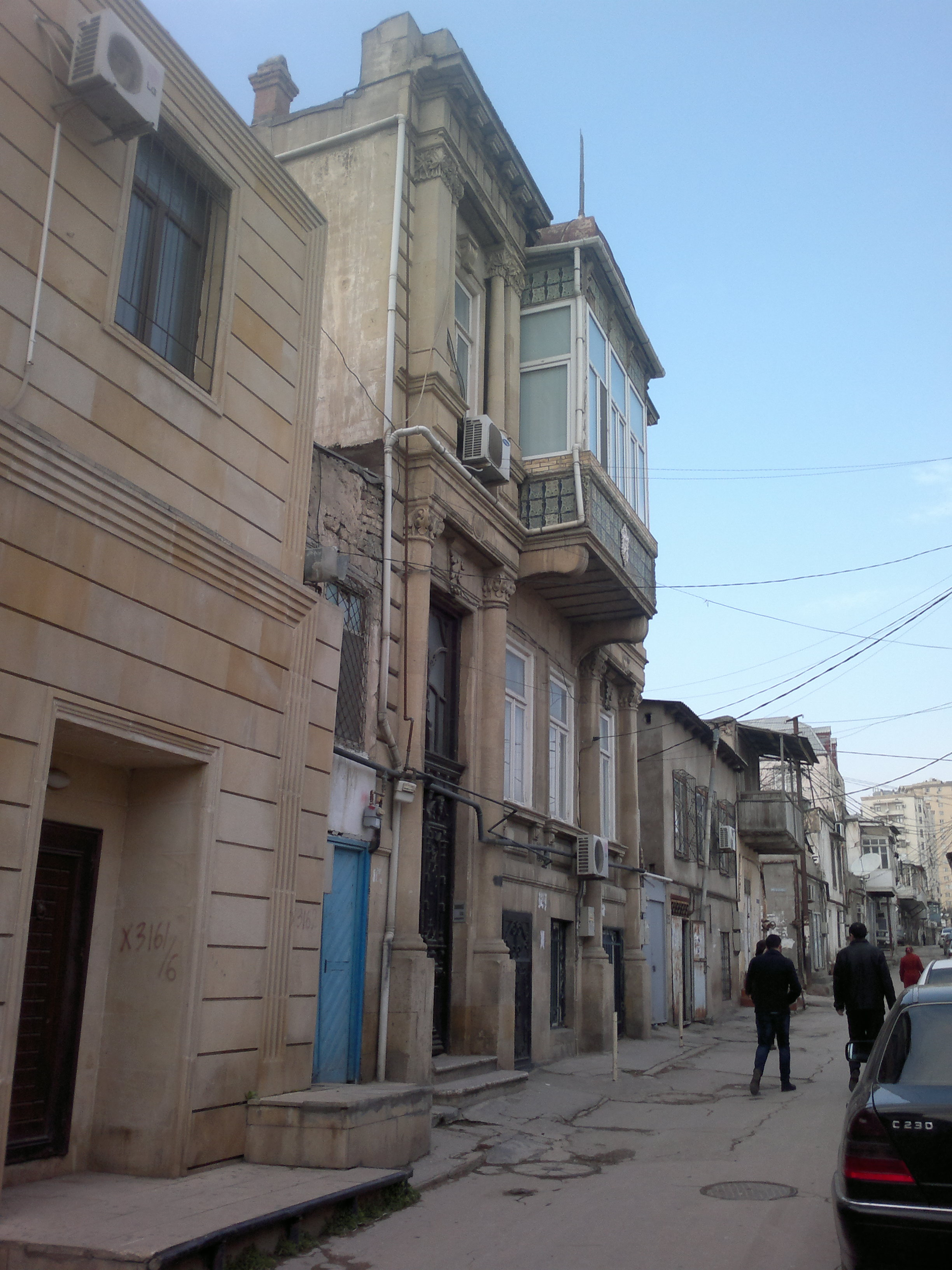 Building on Nabat Ashurbeyova Street 121